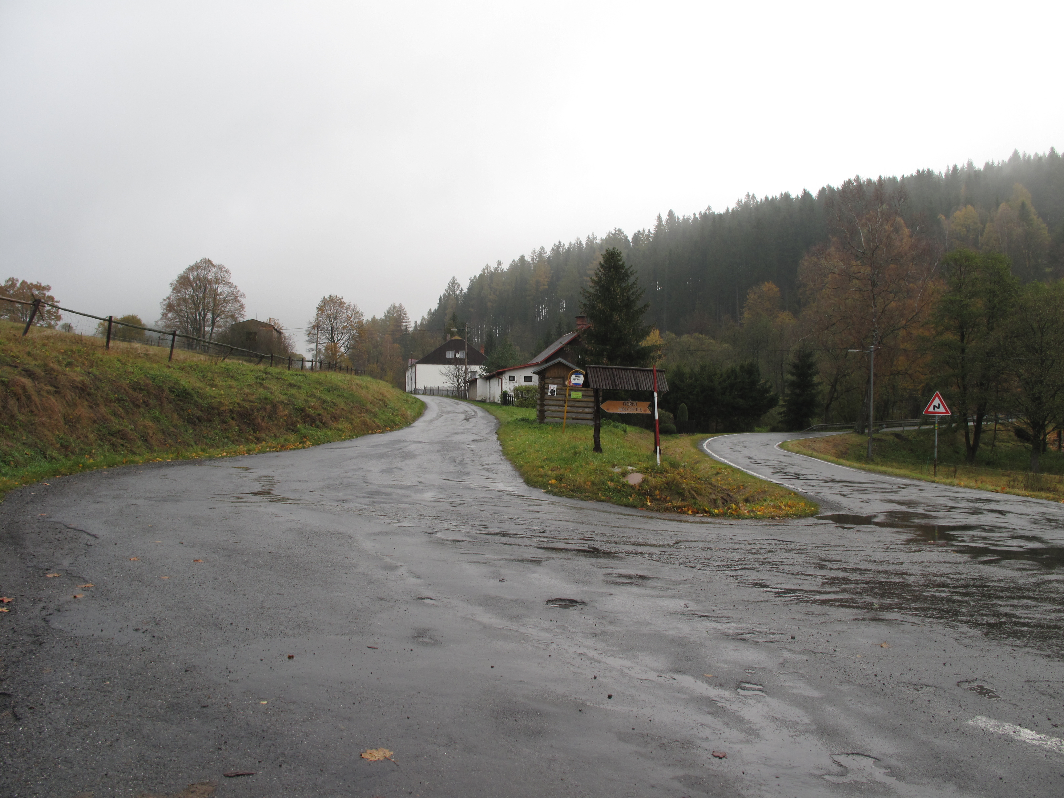 Jelení (Holčovice). Okres Bruntál, Česká republika.